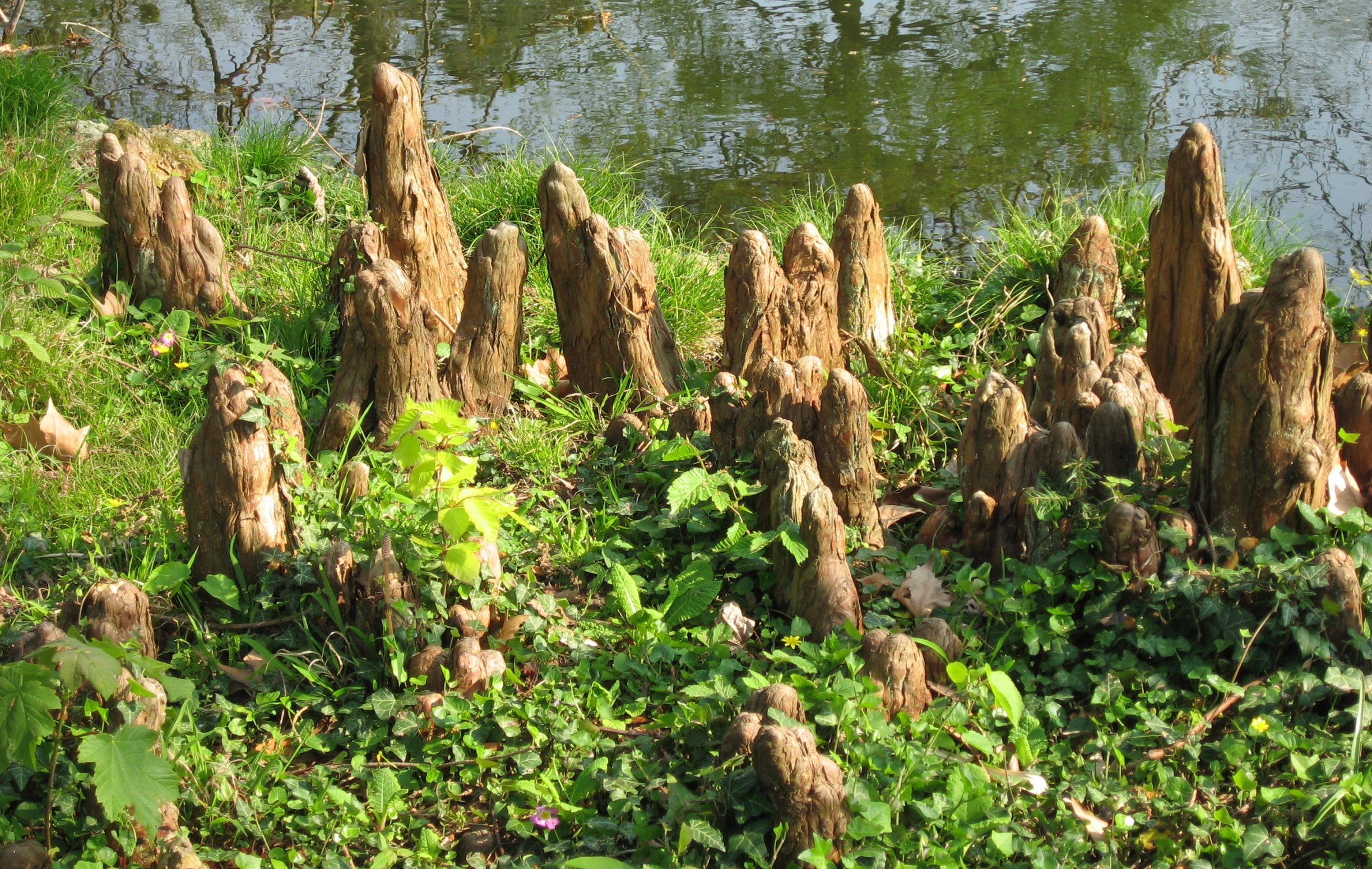 Racine aérienne (Pneumatophore) de Taxodium distichum (Cyprès chauve) in Arboretum de la Vallée-aux-Loups Map: 48° 46' 22" N 2° 16' 5" E